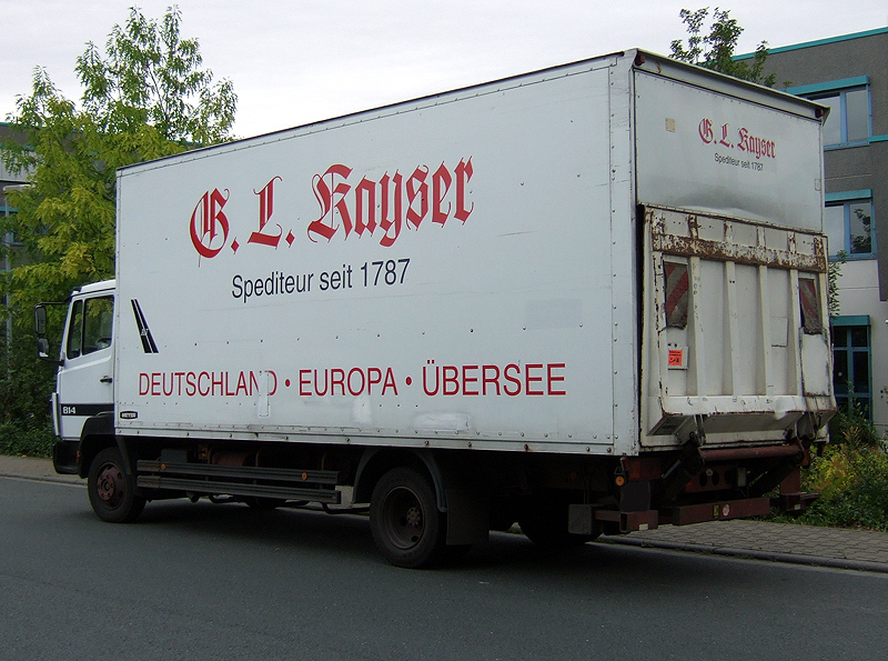 LKW der Firma G.L. Kayser